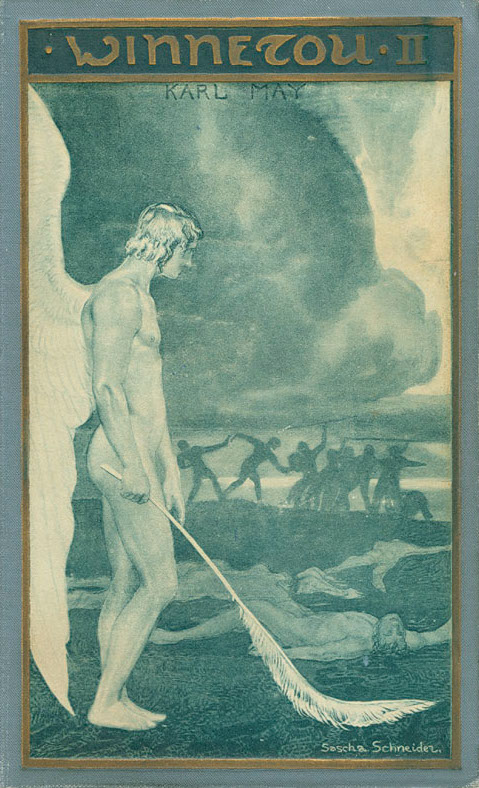 Buchdeckel des Romans Winnetou II von Karl May. Ausgabe von 1905, gestaltet von Sascha Schneider.